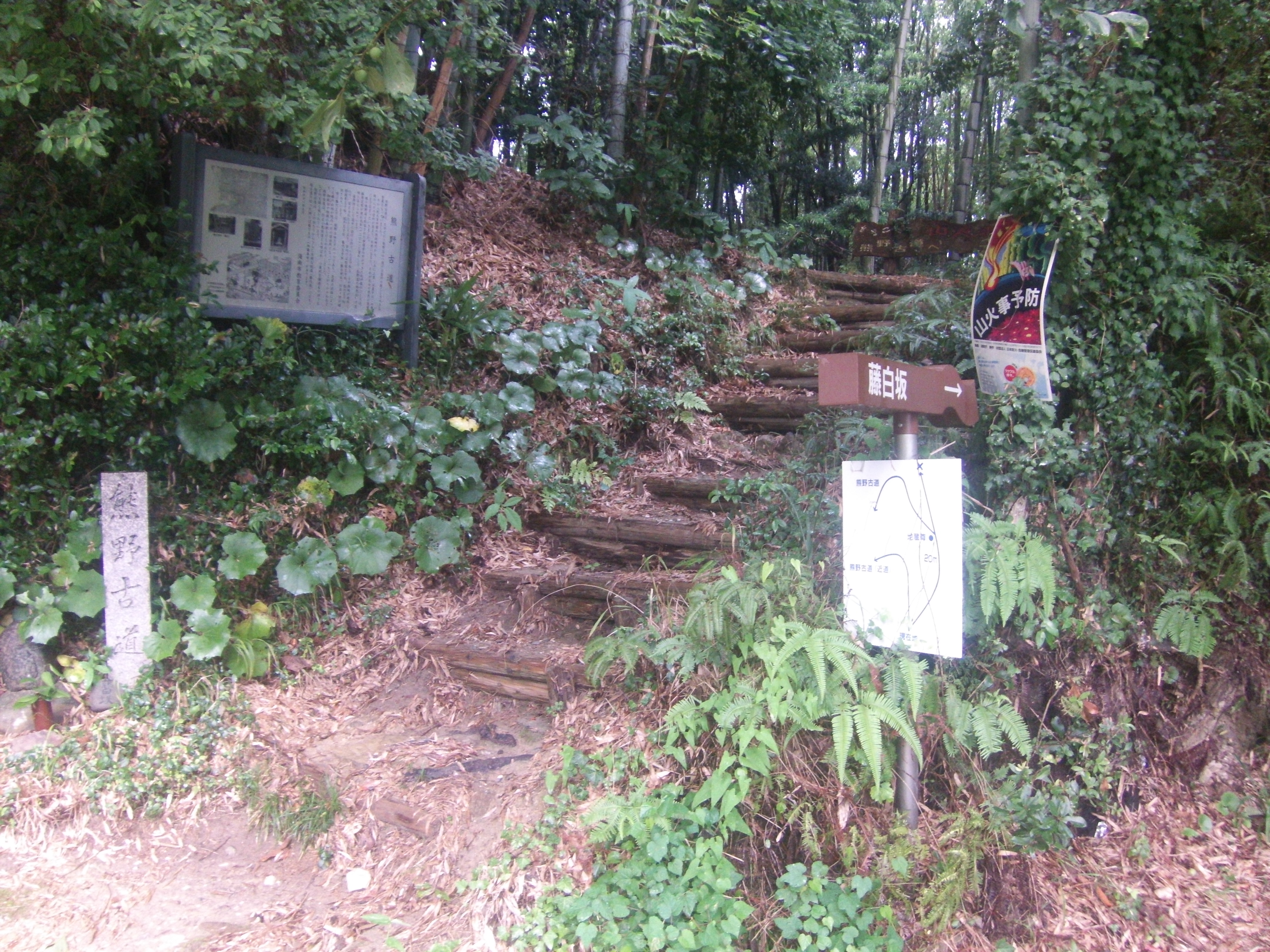 熊野古道・紀伊路の藤白坂登り口